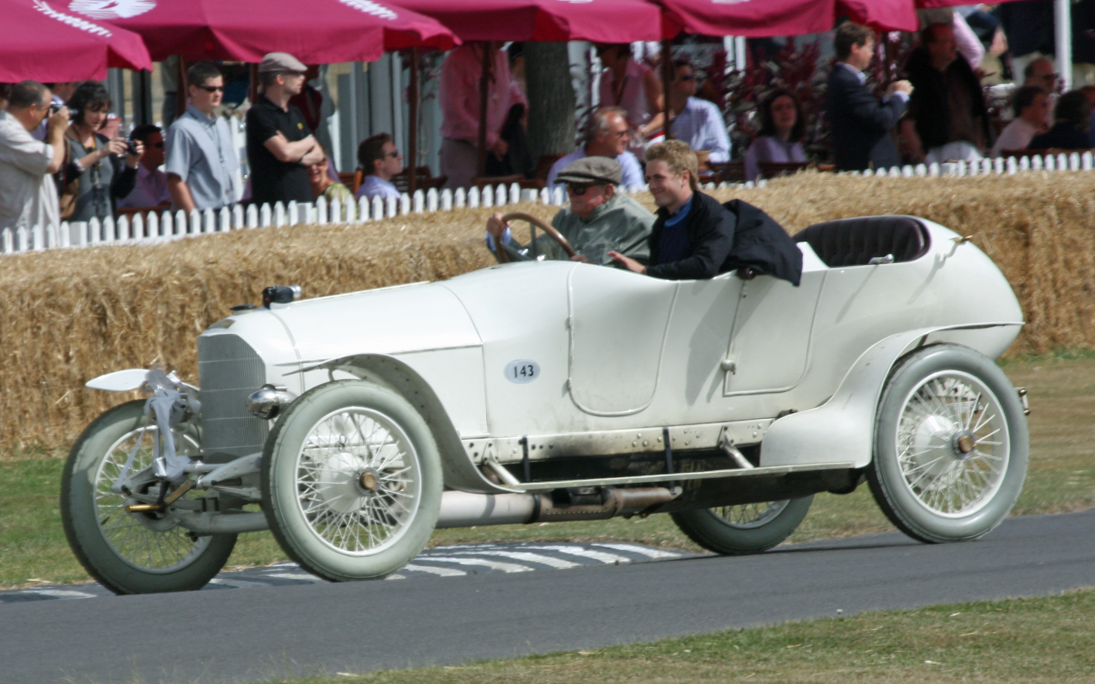 Goodwood 2009